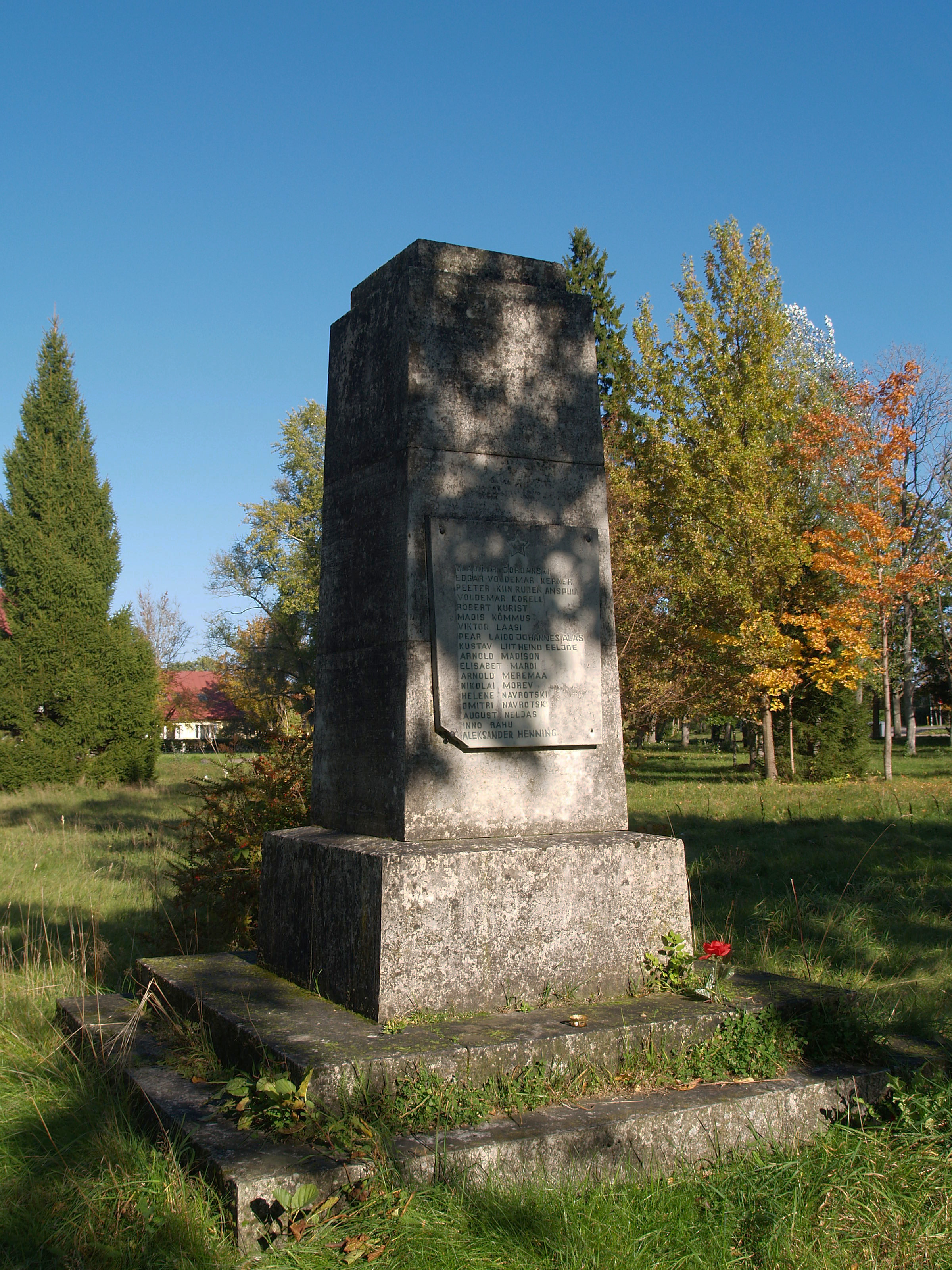 II maailmasõjas hukkunute ja terroriohvrite ühishaud